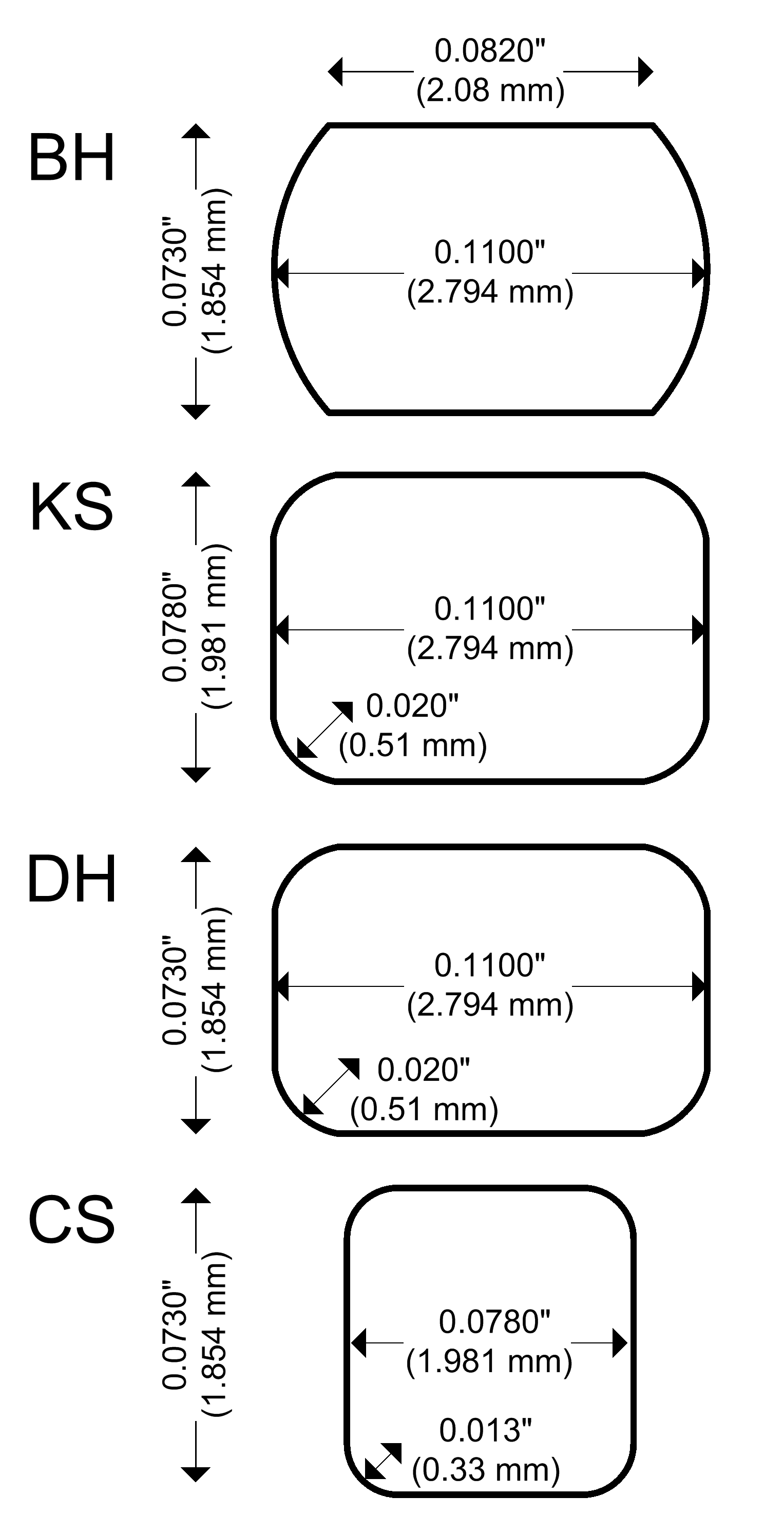 BH, KS, DH and CS sprockets from 35 mm film.